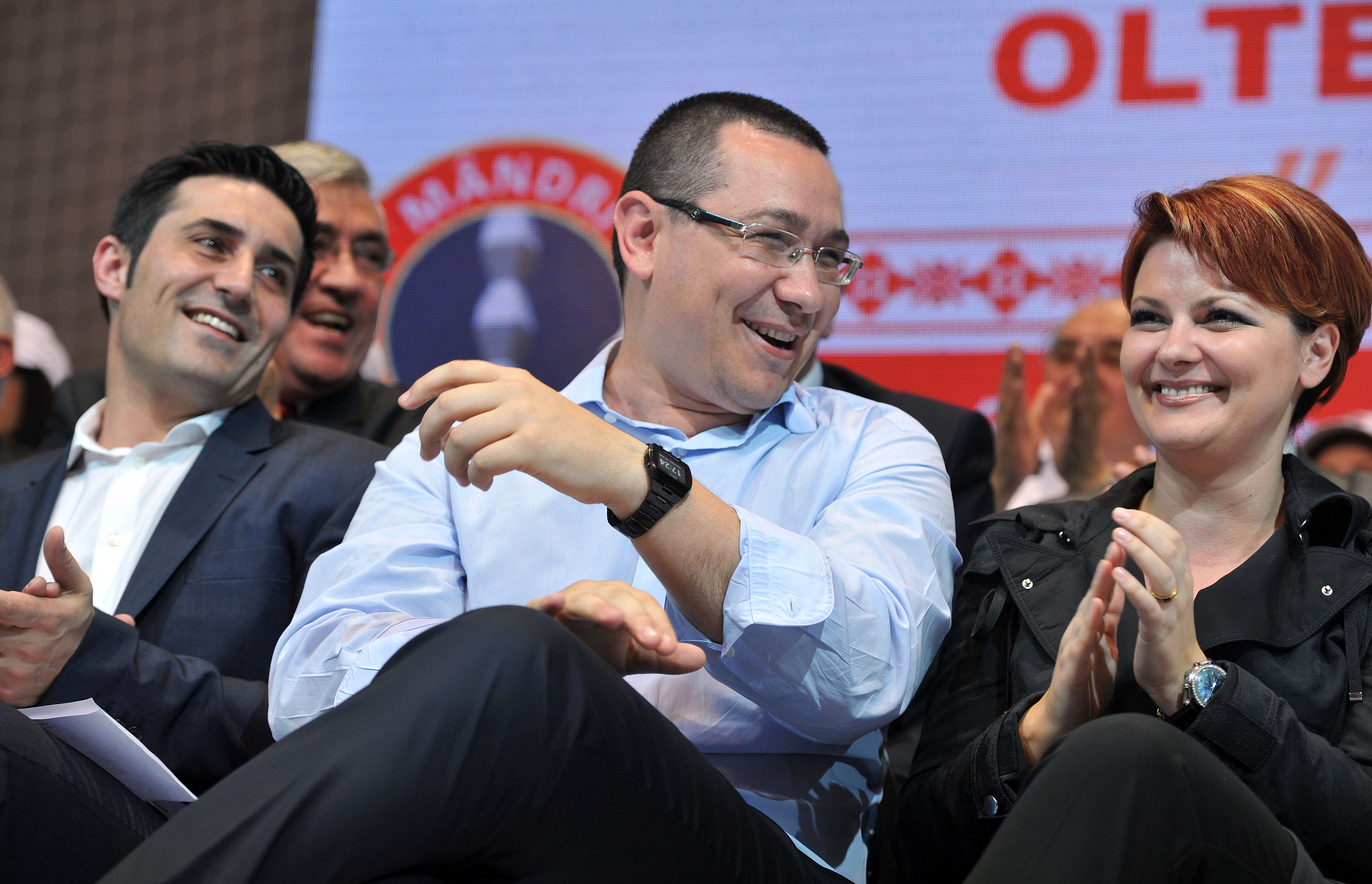 Lansarea candidatilor Aliantei Electorale PSD-UNPR-PC la alegerile pentru Parlamentul European de la Craiova - 03.05 (24)